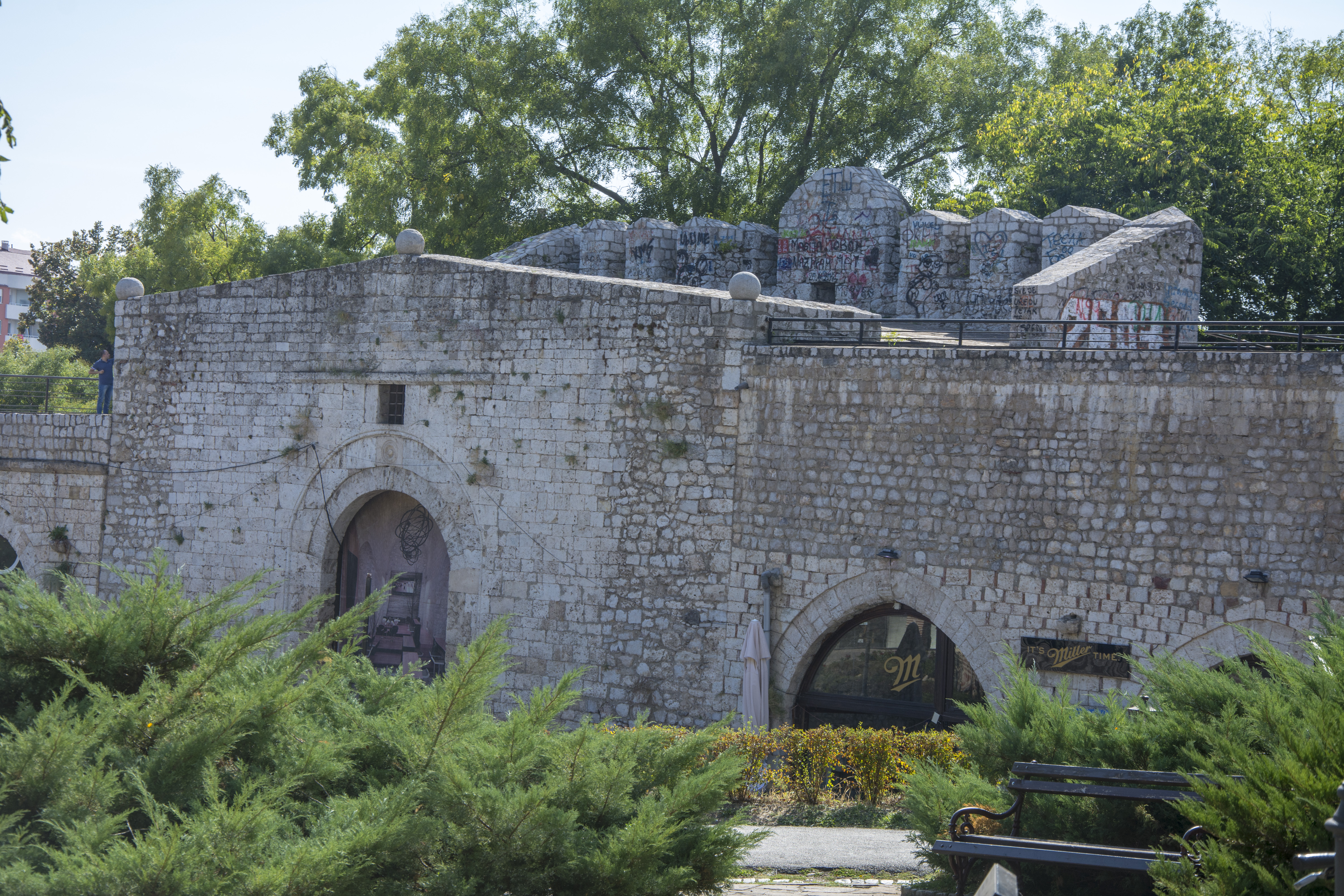 Град Ниш